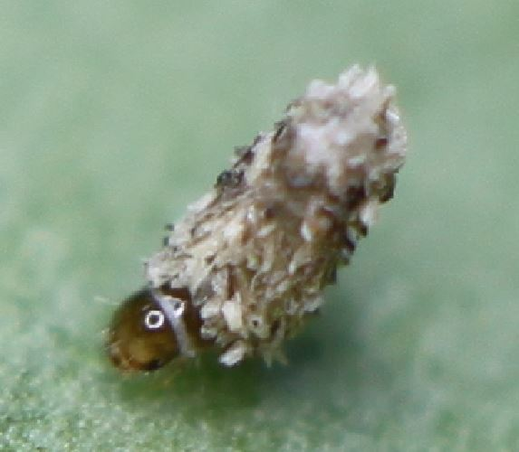 Frisch geschlüpfte Raupe des Kleine Rauch-Sackträgers, am 3. Juni 2018